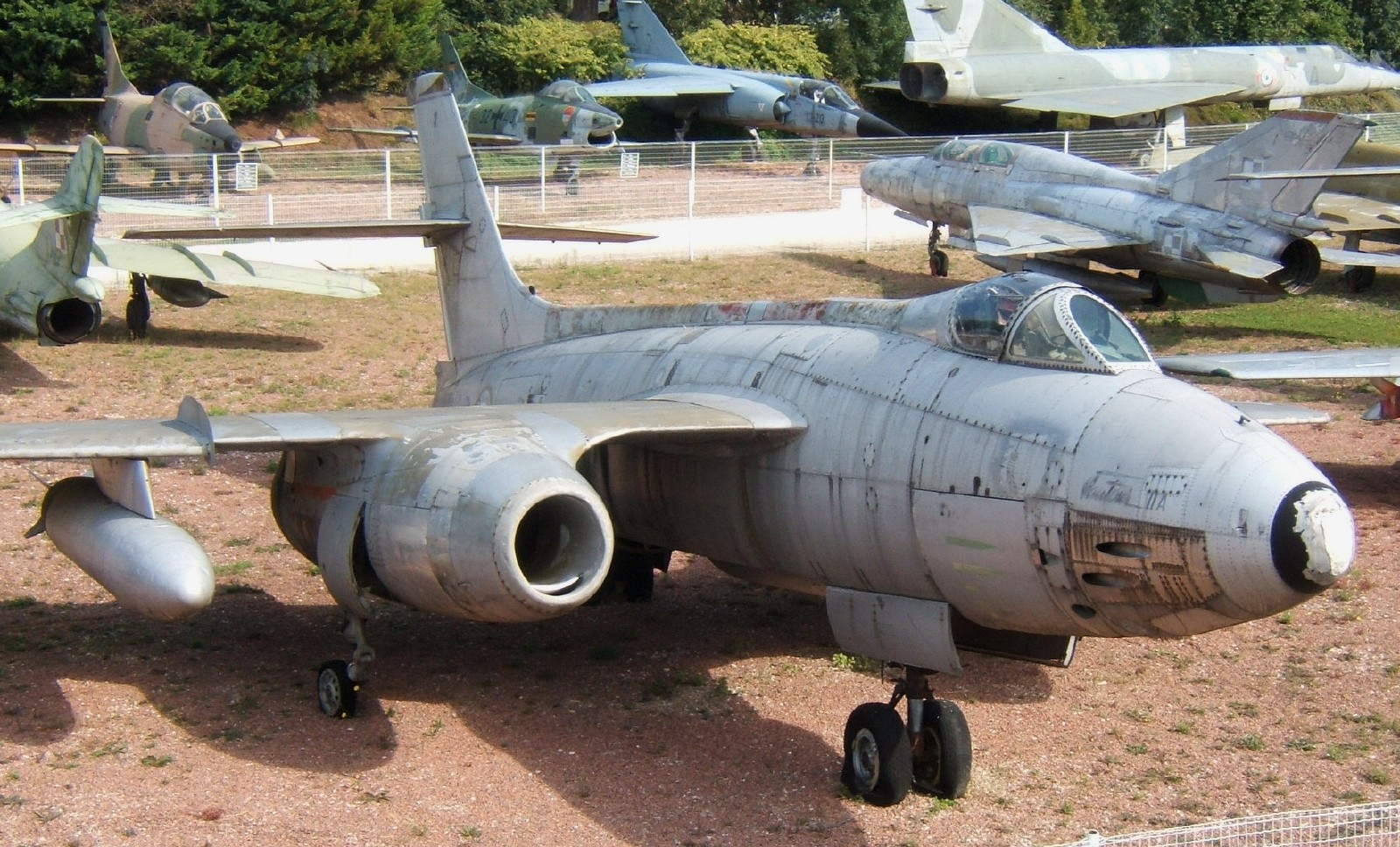 Vautour II A conservé au musée du château de Savigny-les-Beaunes